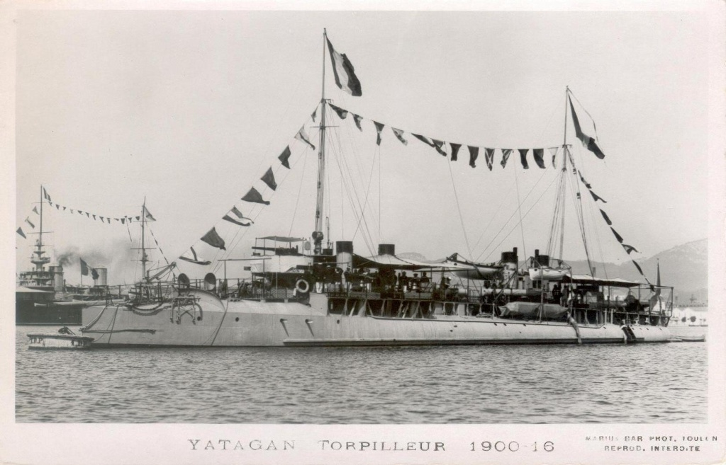 Destroyer français de classe Framée Yatagan